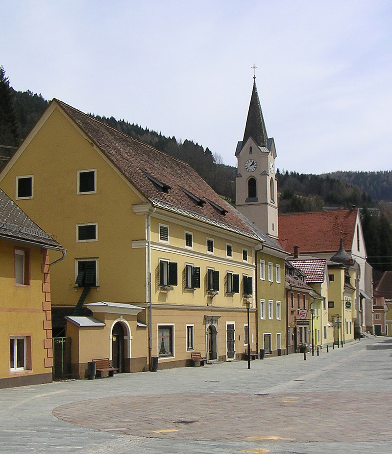 Marktplatz von Hüttenberg mit Blick auf die Pfarrkirche (Reiftanzplatz)